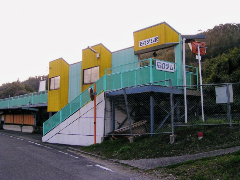 2005年3月28日に投稿者が石打ダム駅にて撮影。